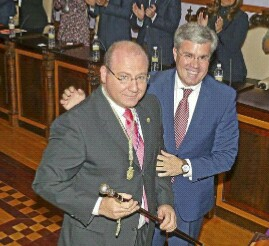 Relevo en la alcaldia de Jaen